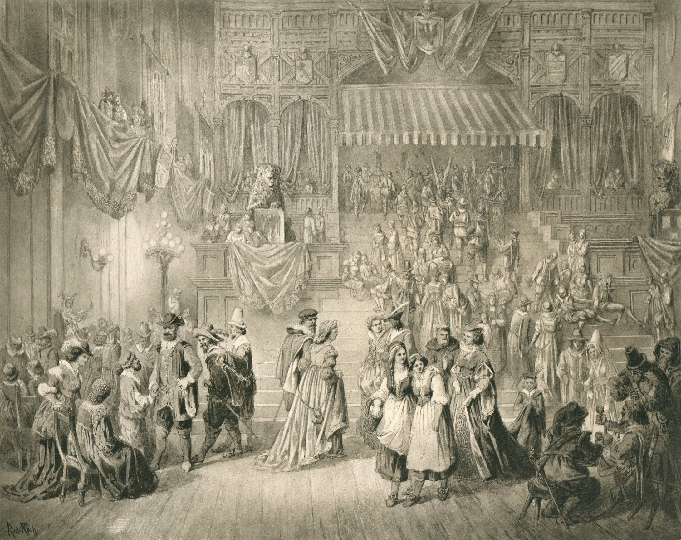 Kostümfest des Vereins für Kunst und Wissenschaft 1873 Hamburg